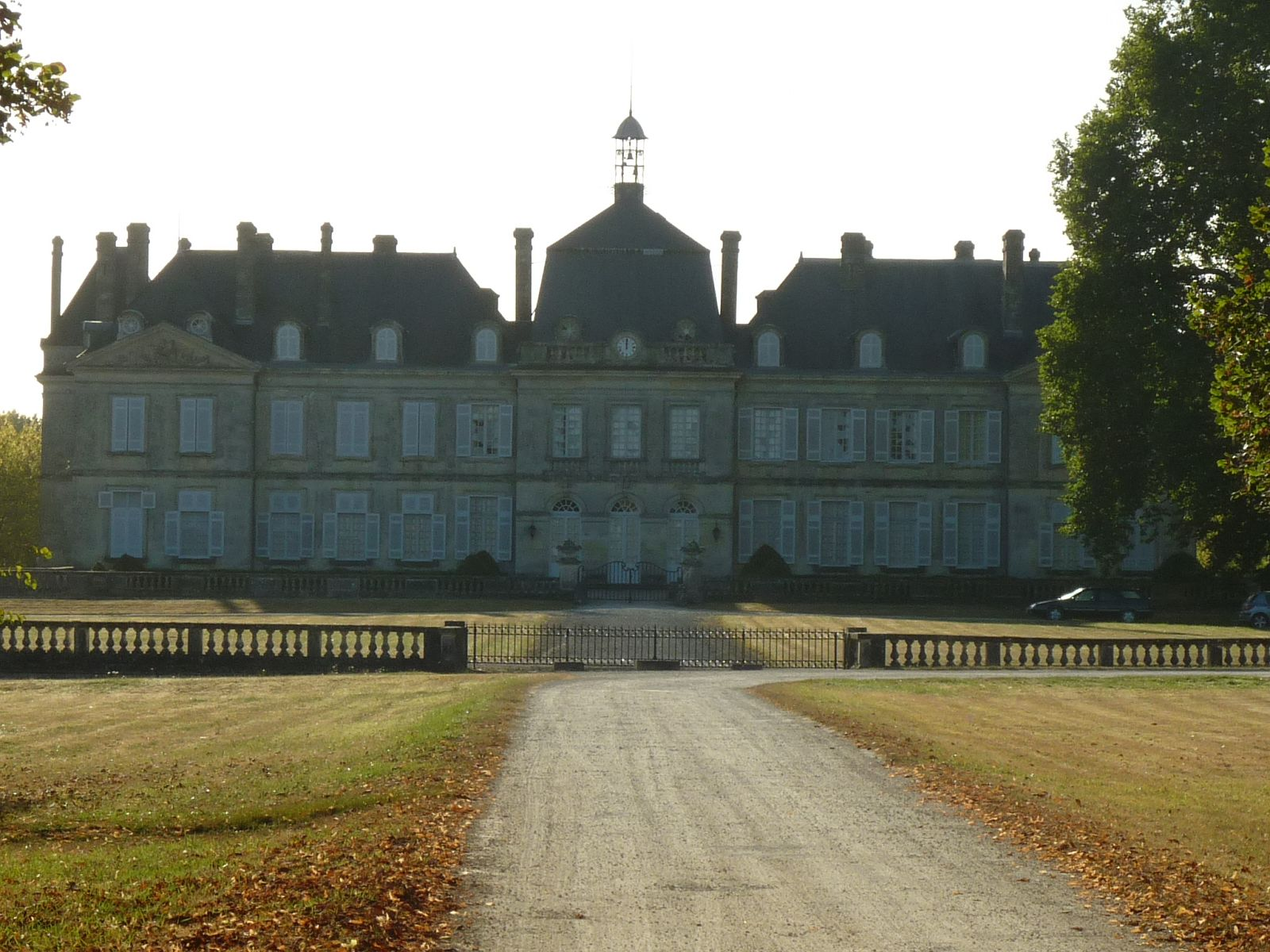 château de Plassac (17), France.